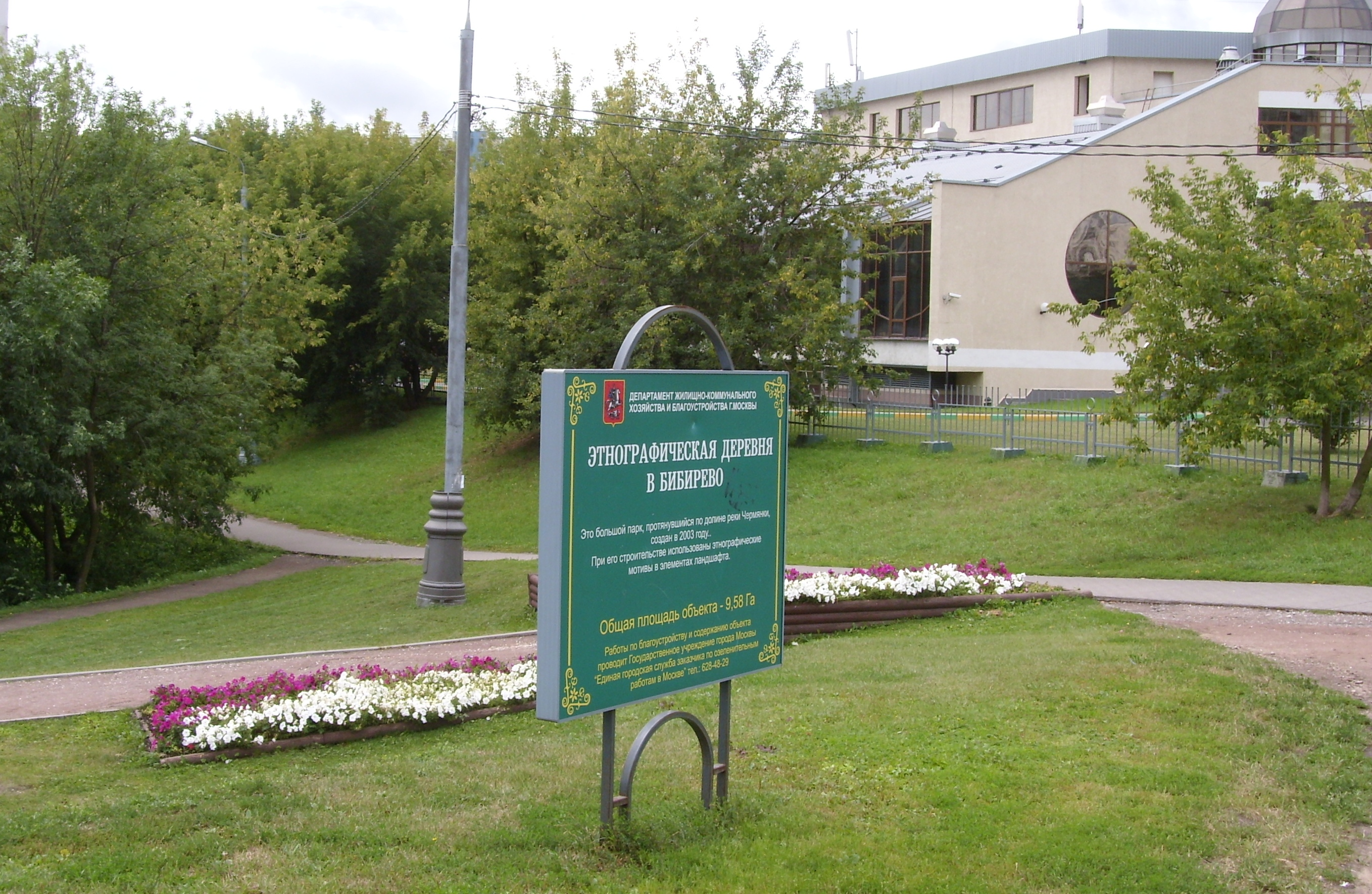 Плакат на входе в парк "Этнографическая деревня Бибирево"